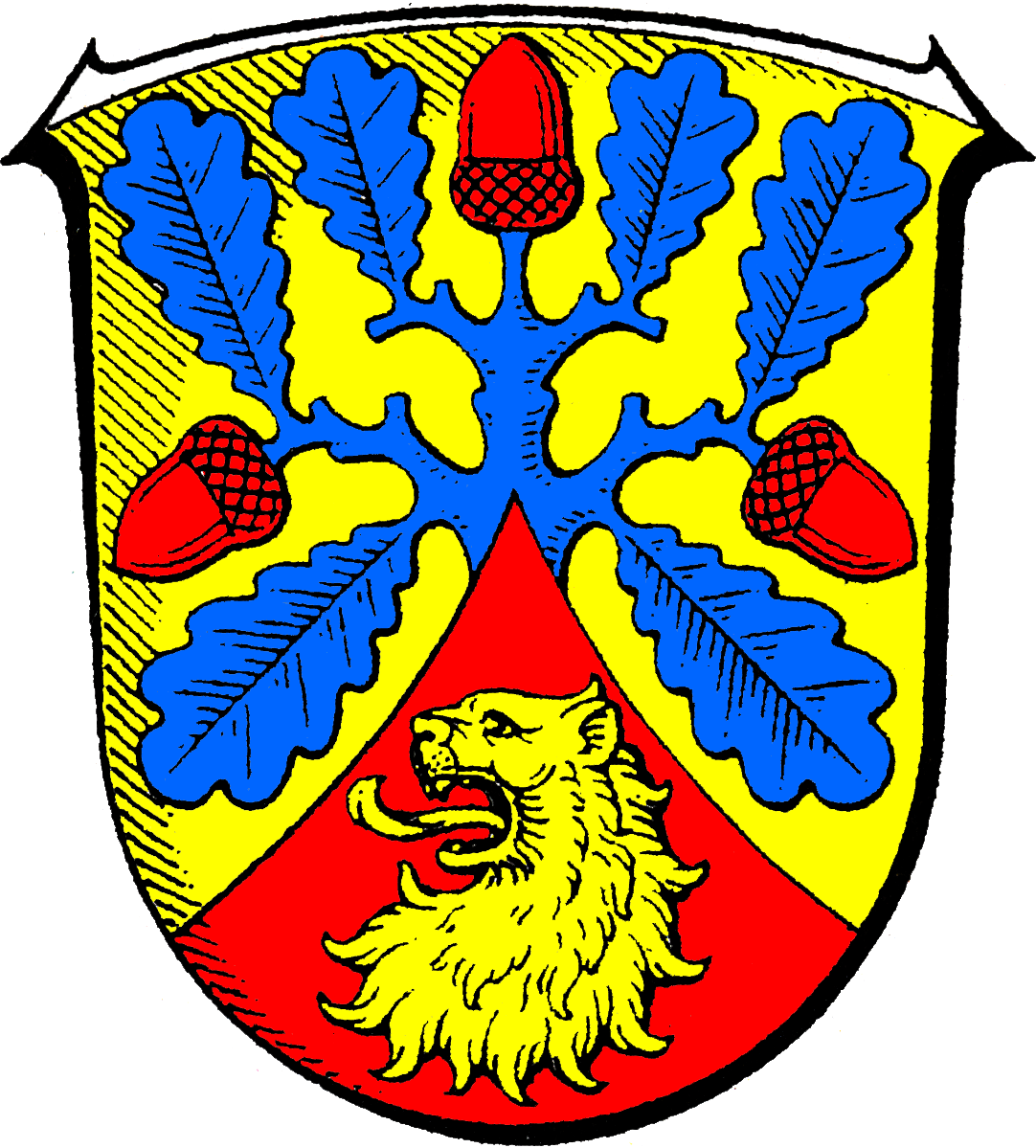 Wappen von Hohenahr